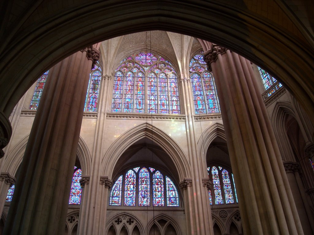 Une partie de la face nord du choeur gothique de la cathédrale du Mans